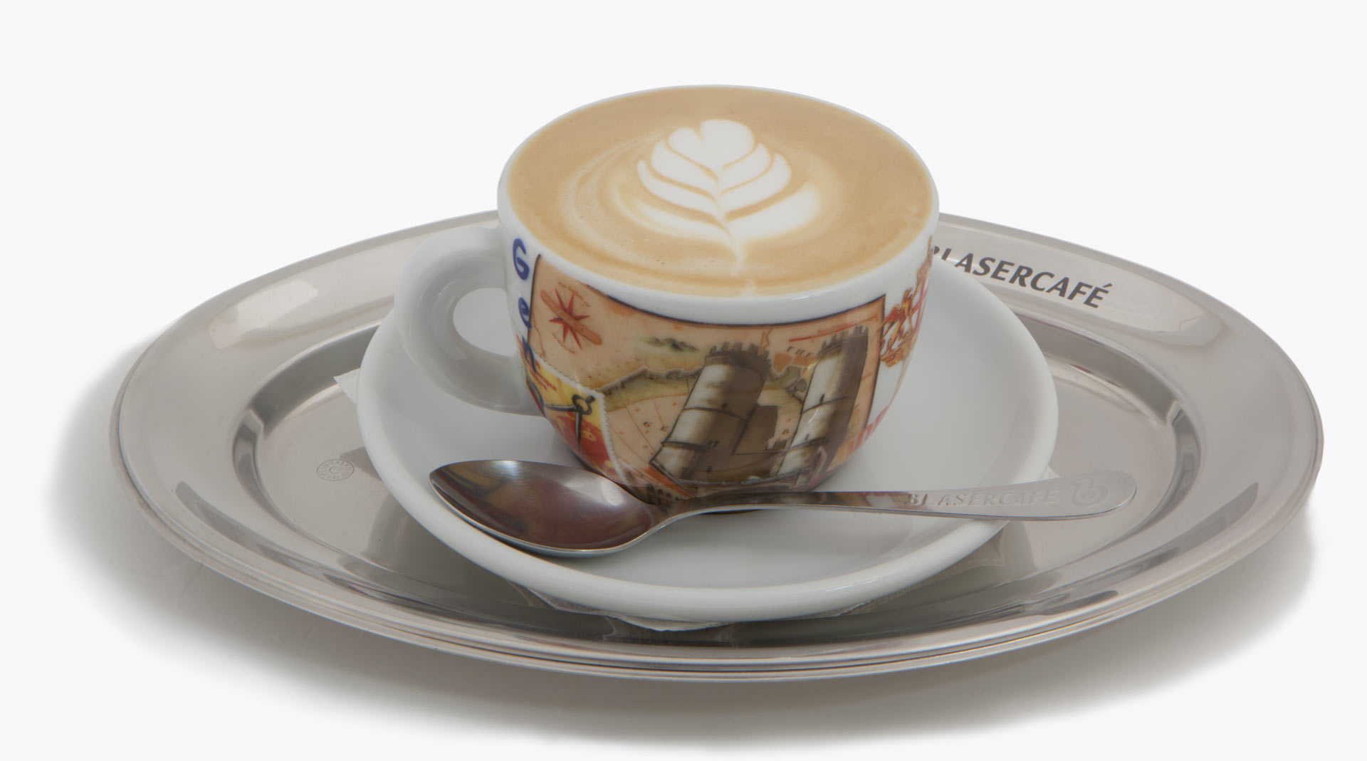 Капучино. Сервіровано в шоу-румі "КофеМаркет", Київ.